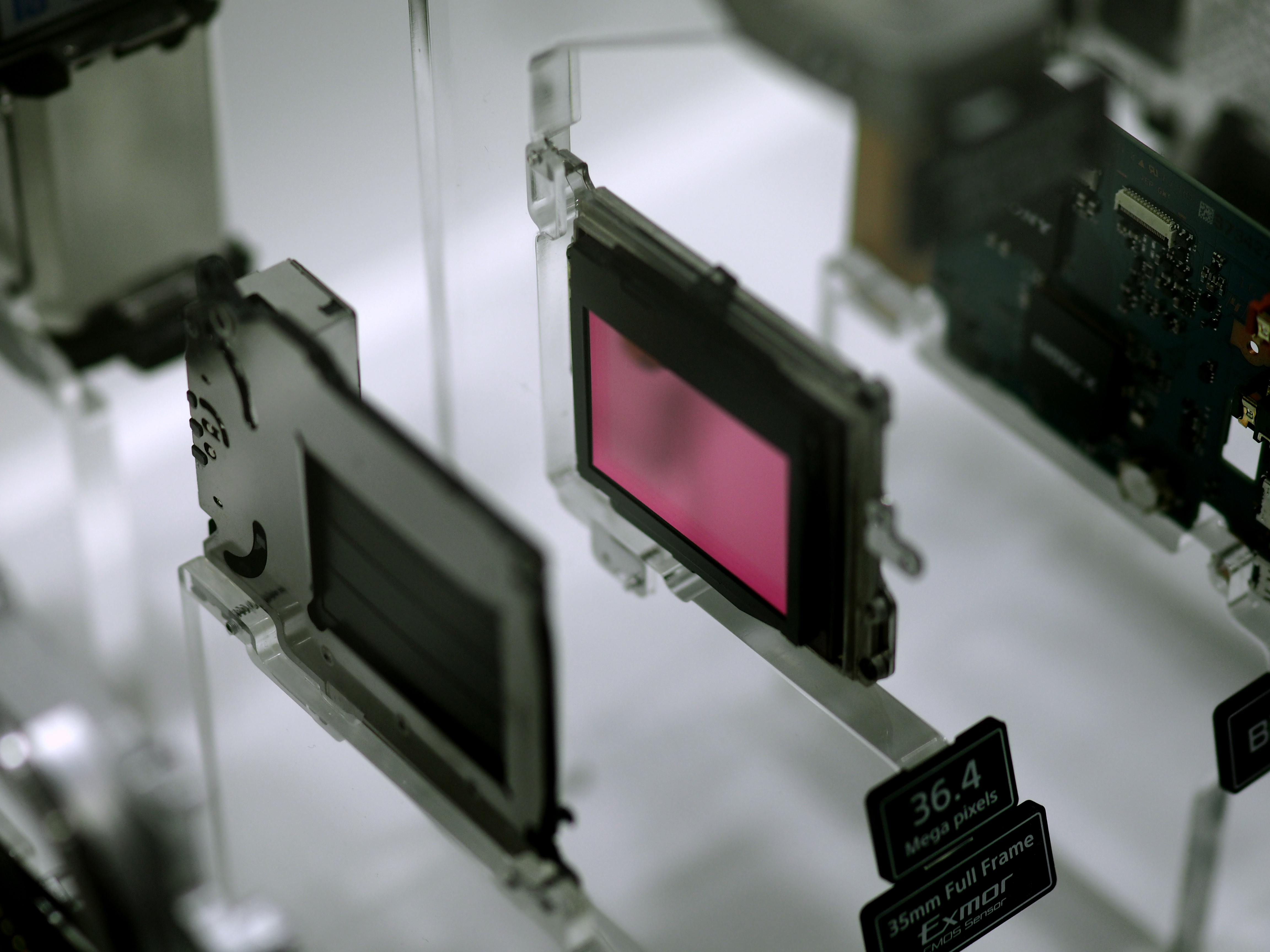 Sony α7R full-frame sensor.